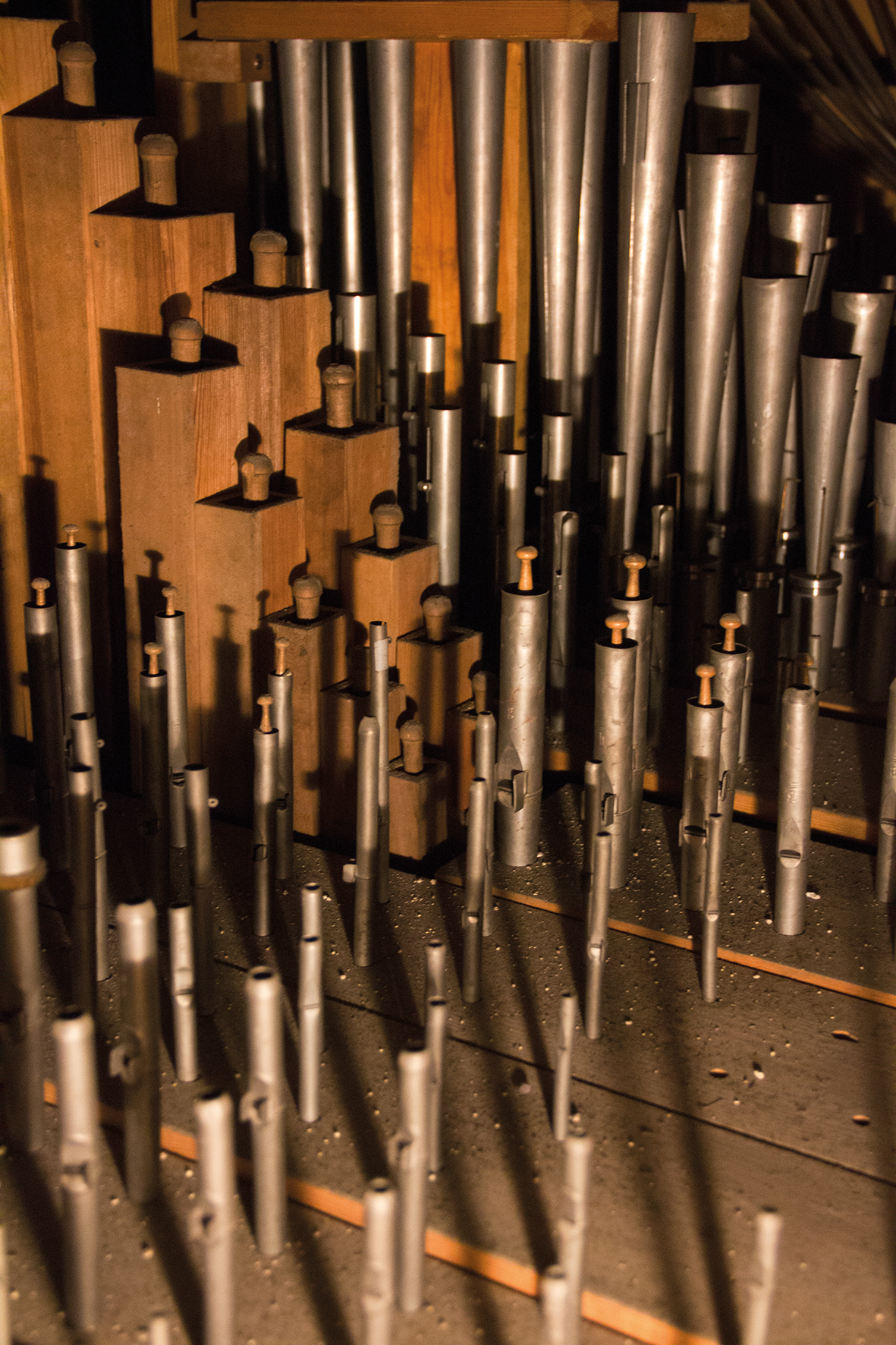 Einige Pfeifen im Schwellwerk der Strebel-Orgel in St. Michael zu Stadtsteinach. Das Foto dokumentiert den Zustand 2017.